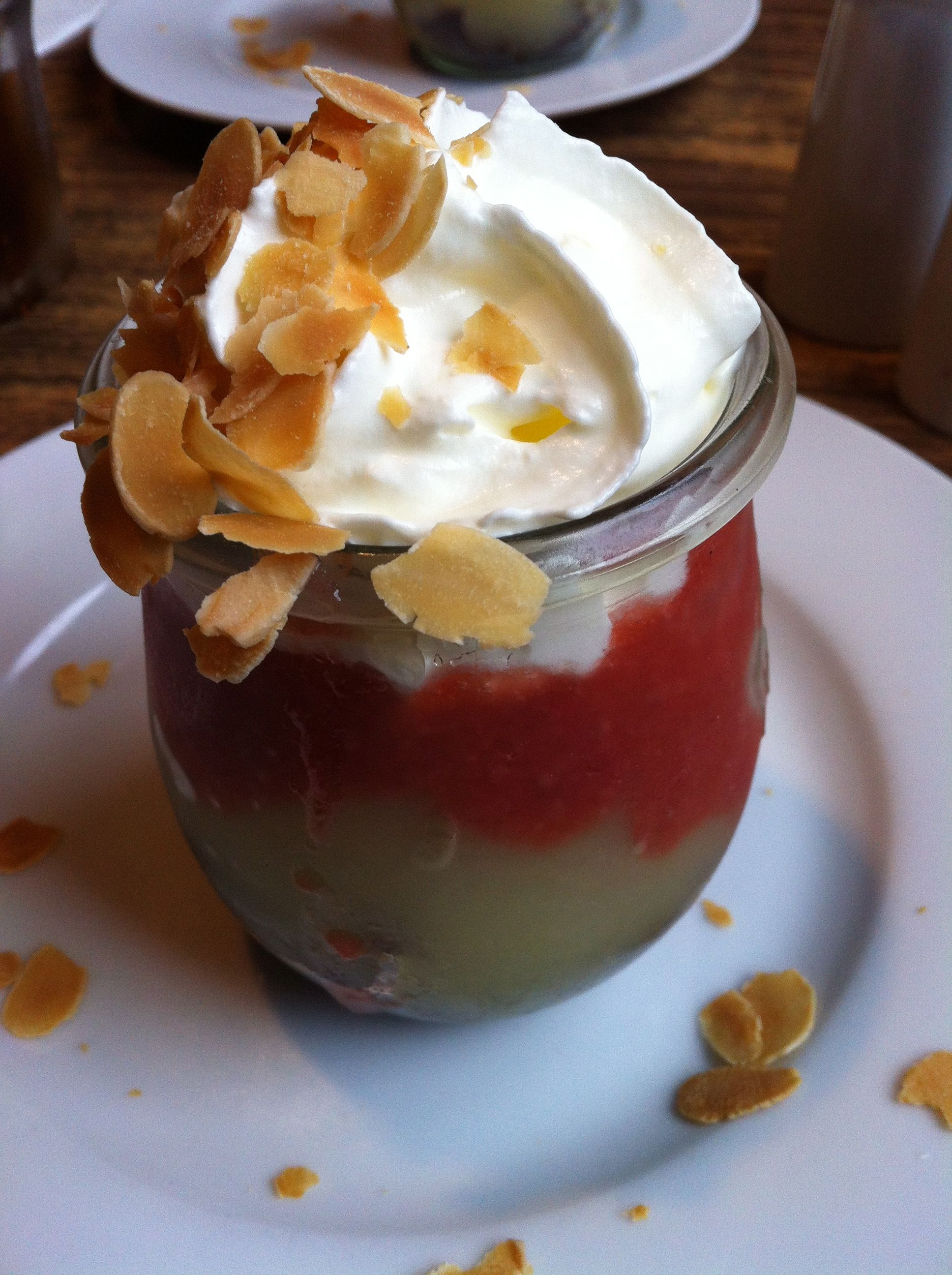 Das norddeutsche Dessert "Verschleiertes Bauernmädchen" in der Variation der Oberhafenkantine in Hamburg